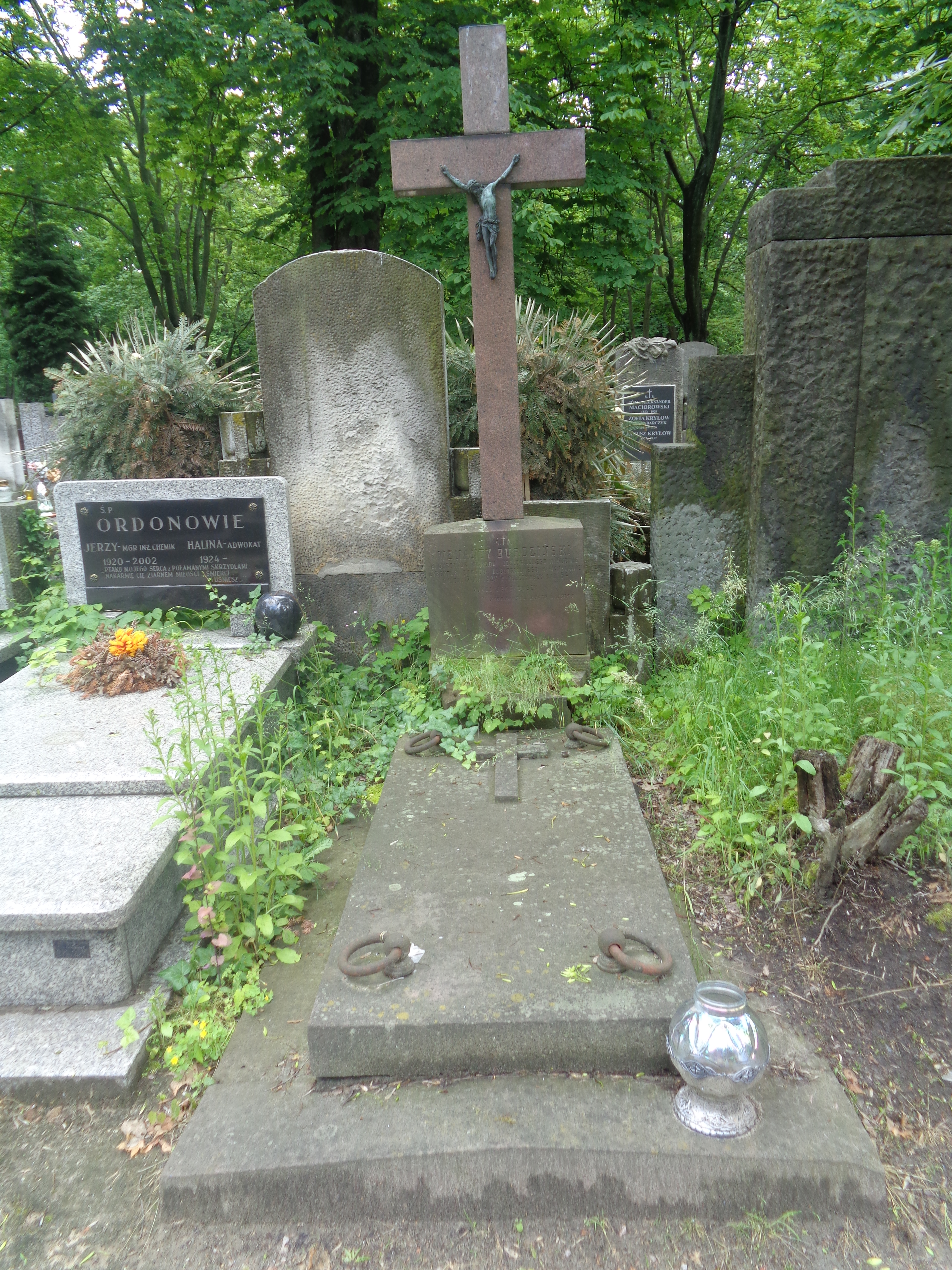 Grób Wenantego Burdzińskiego na Cmentarzu Powązkowskim